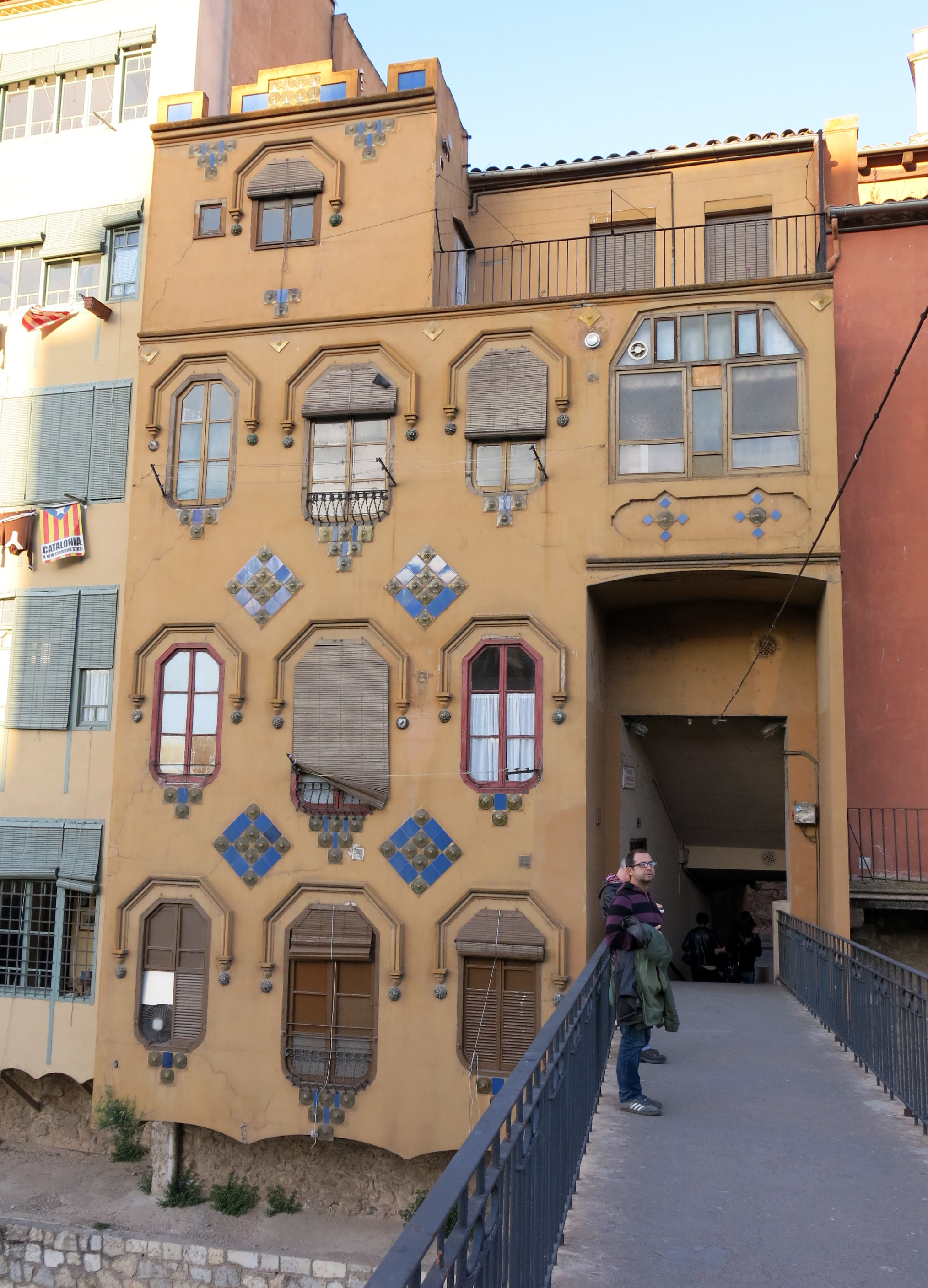 Façana del riu de la casa Miquel Gómez i pont d'en Gómez (Girona)